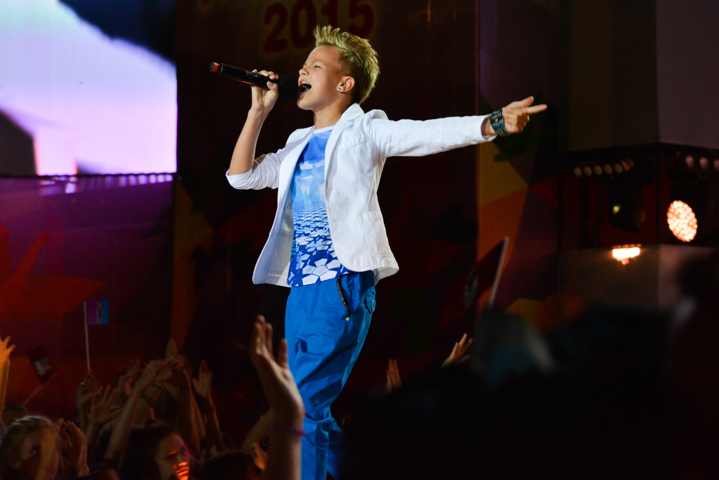 Лауреат "Детской Новой волны 2015" (Артек)